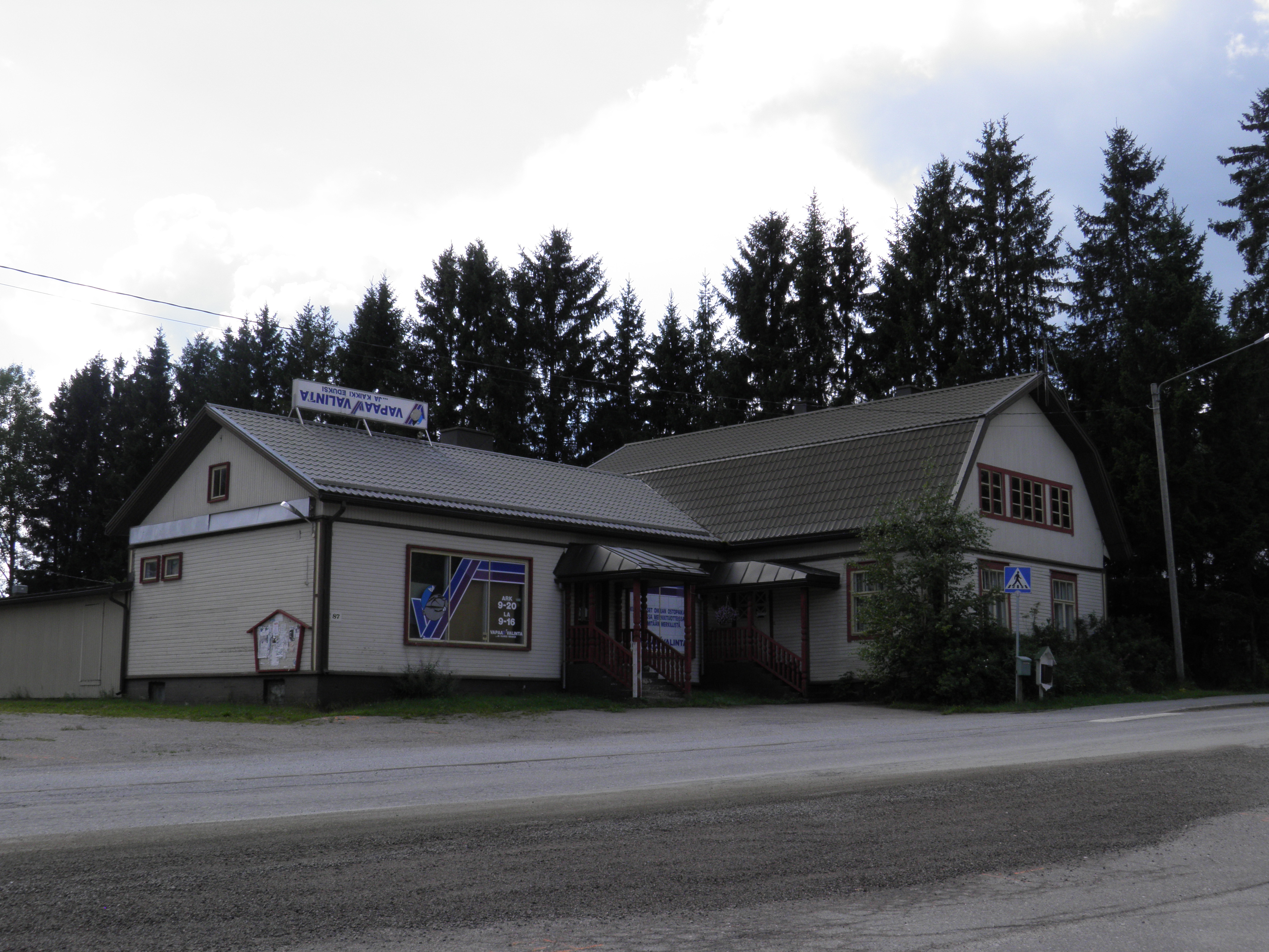 Vapaa Valinnan rakennus Häijäässä Sastamalan Mouhijärvellä.